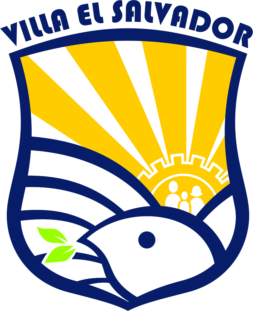 Distrito de Villa el Salvador - Provincia de Lima - Región Lima